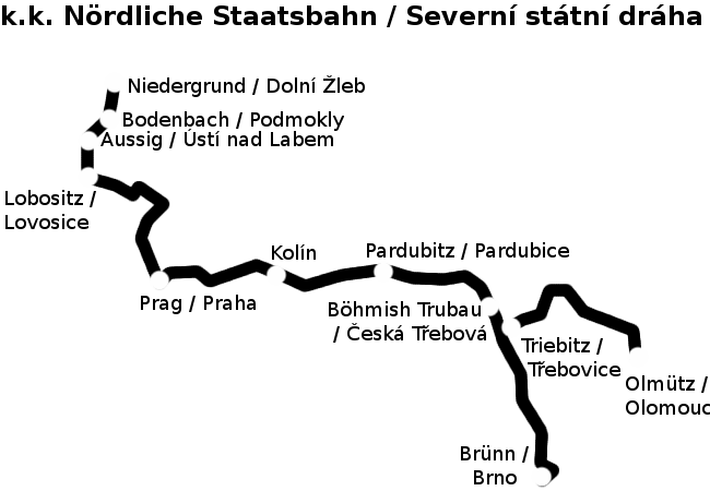 Railway network of k.k. nördliche Staatsbahn selfmade